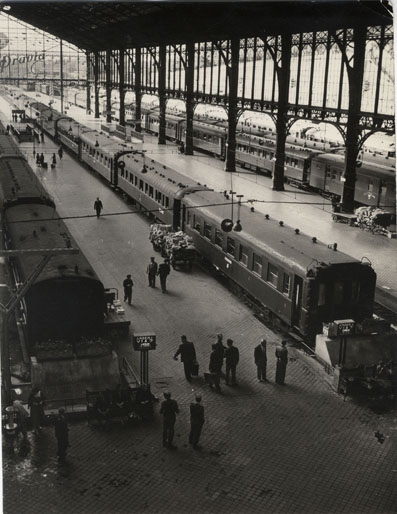 Interior de la estacion del Norte de Madrid.